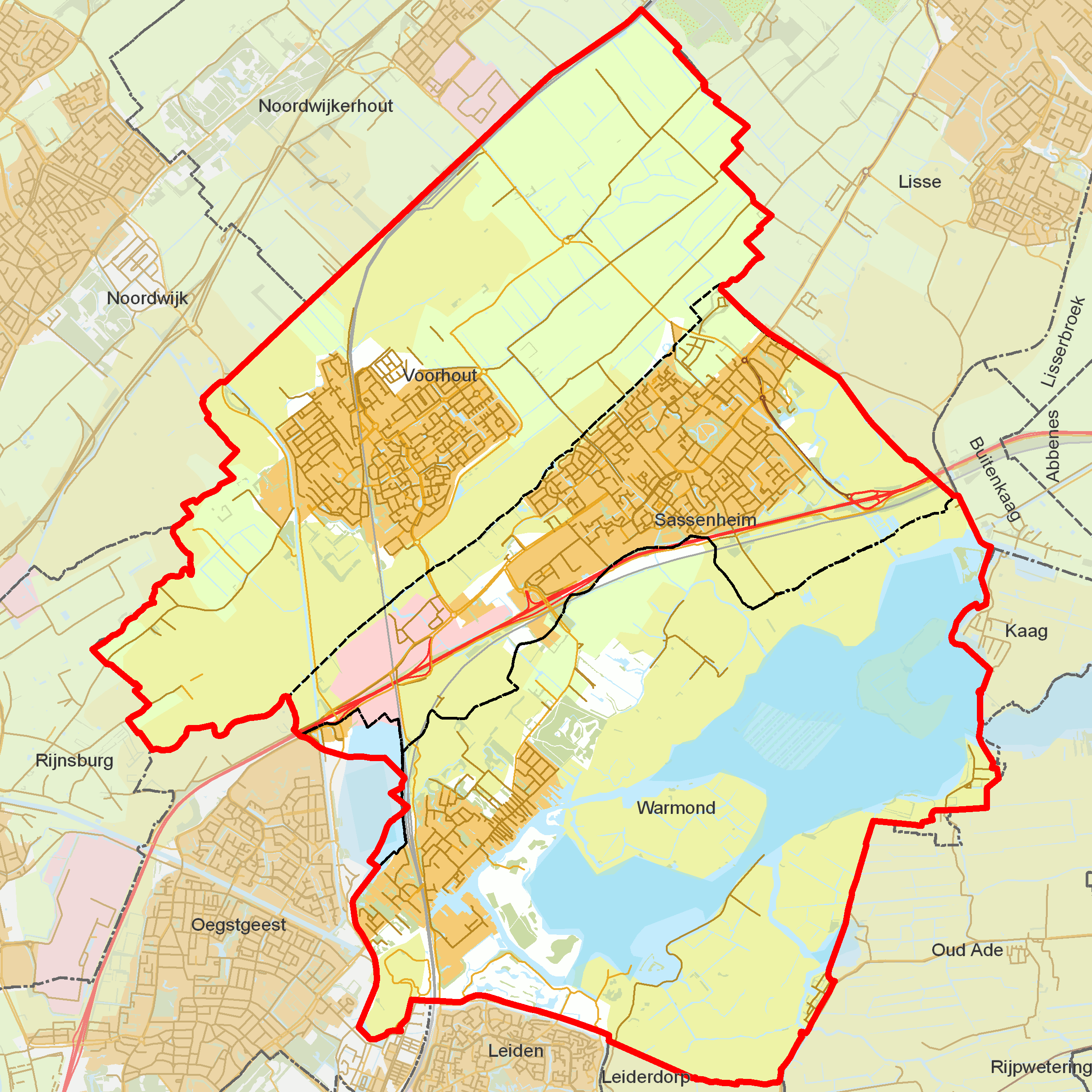 BAG woonplaatsen - Gemeente Teylingen.png